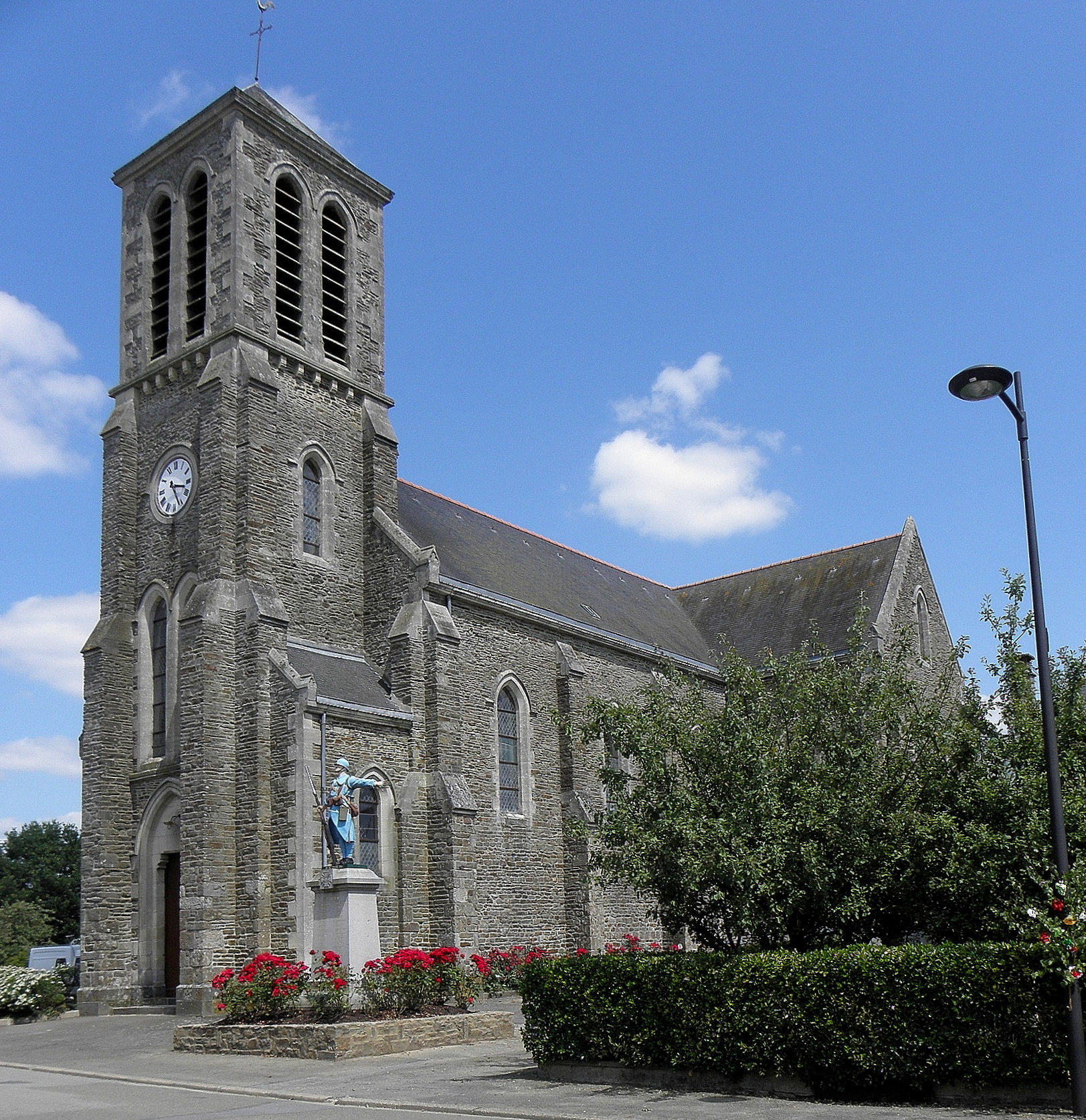 Église Saint-Julien de Saint-Julien-du-Terroux (53).